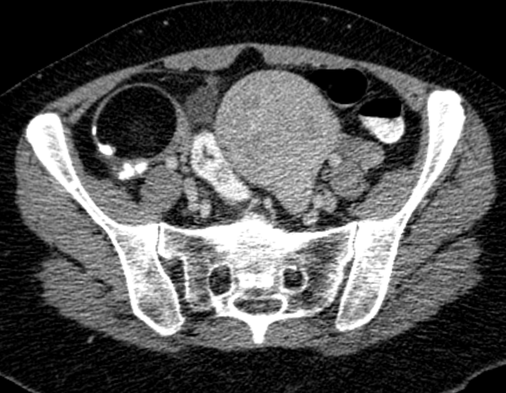 Teratom des rechten Ovars in der Computertomographie mit sehr dichten Anteilen (Zahnanlagen!?). Gleichzeitig grosses Uterusmyom.